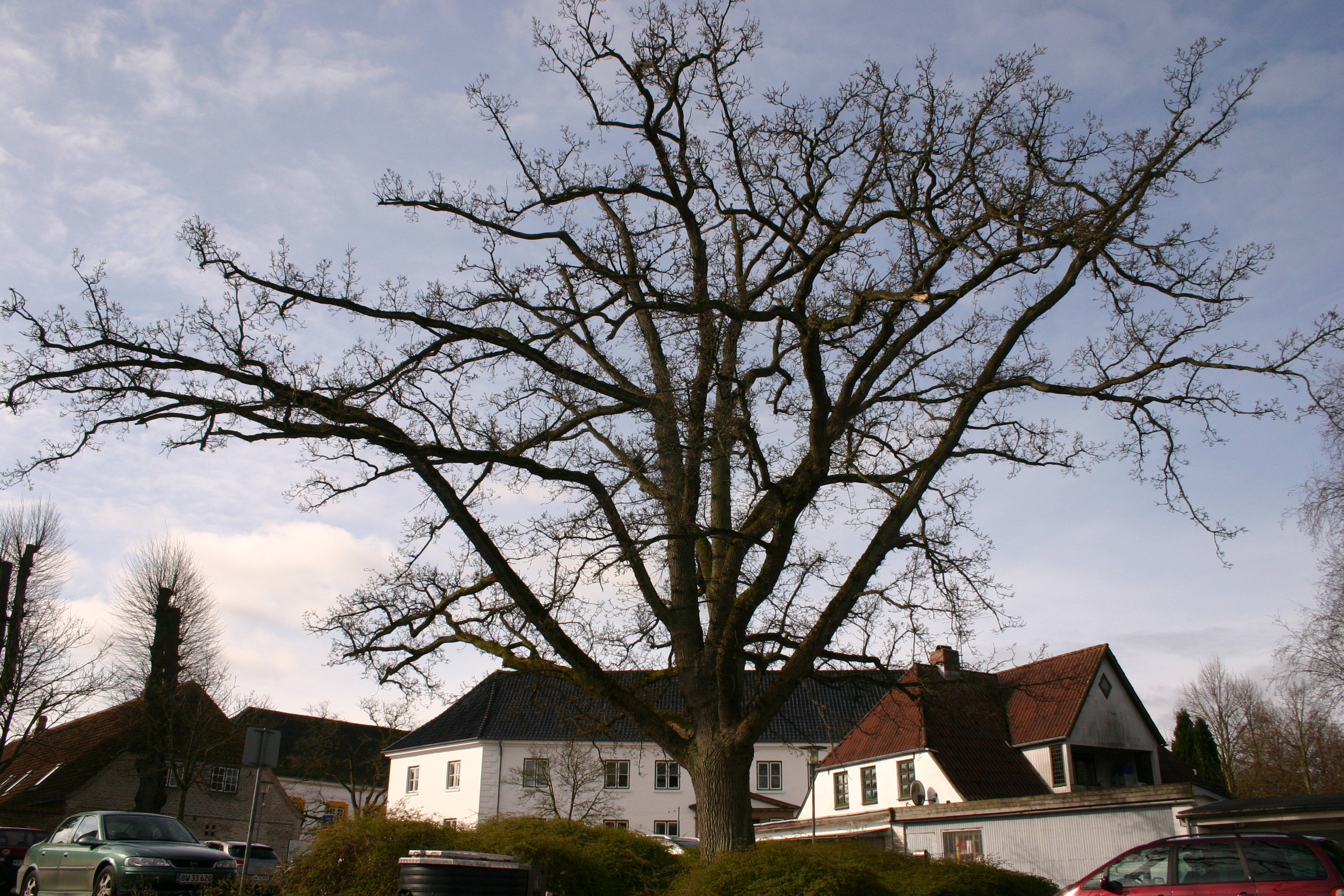 Danmarks Naturfredningsforening har udnævnt fredsegen i Augustenborg til Evighedstræ